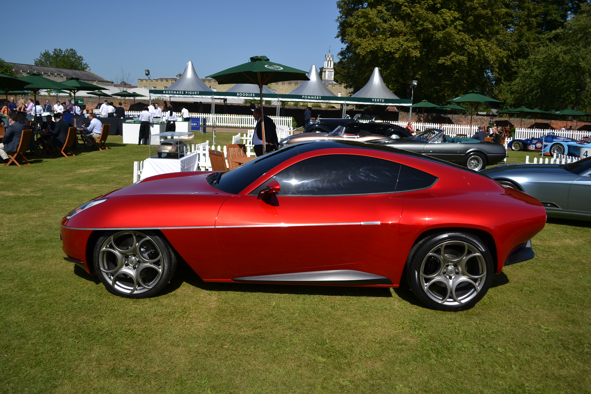 Salon Privé London 2012